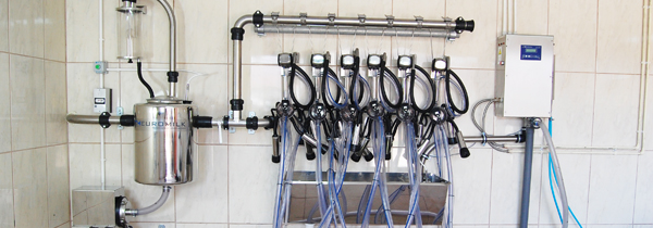 Pomieszczenie dojarki przewodowej. Od lewej jednostka końcowa, aparaty udojowe i automat myjący.